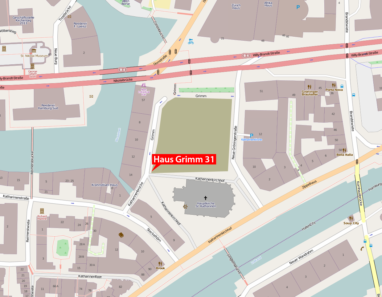 Karte des Hauses Grimm 31 in Hamburg, Deutschland.